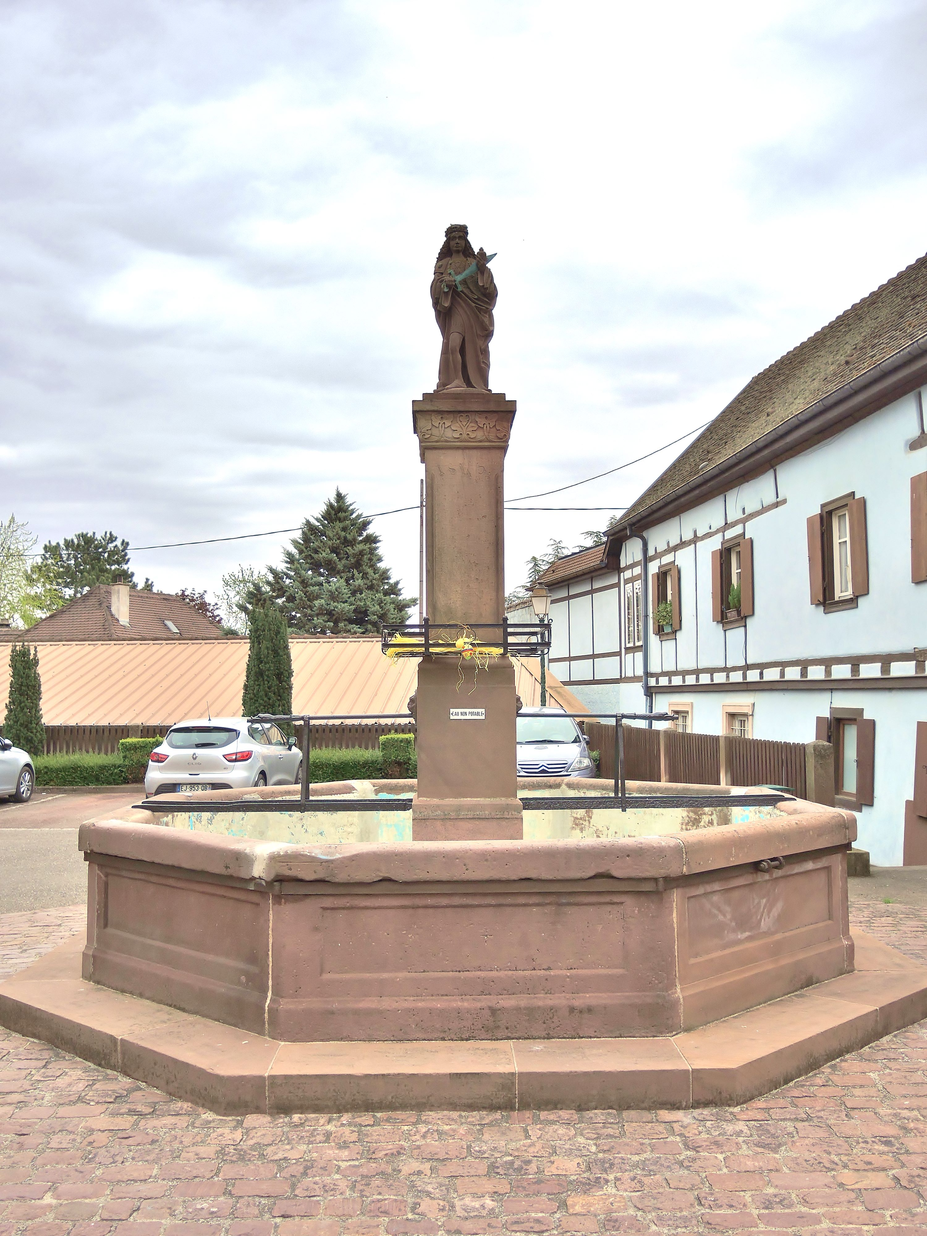 Fontaine Saint Pancrace, sur la place du village d'Husseren-les-Châteaux. Haut-Rhin